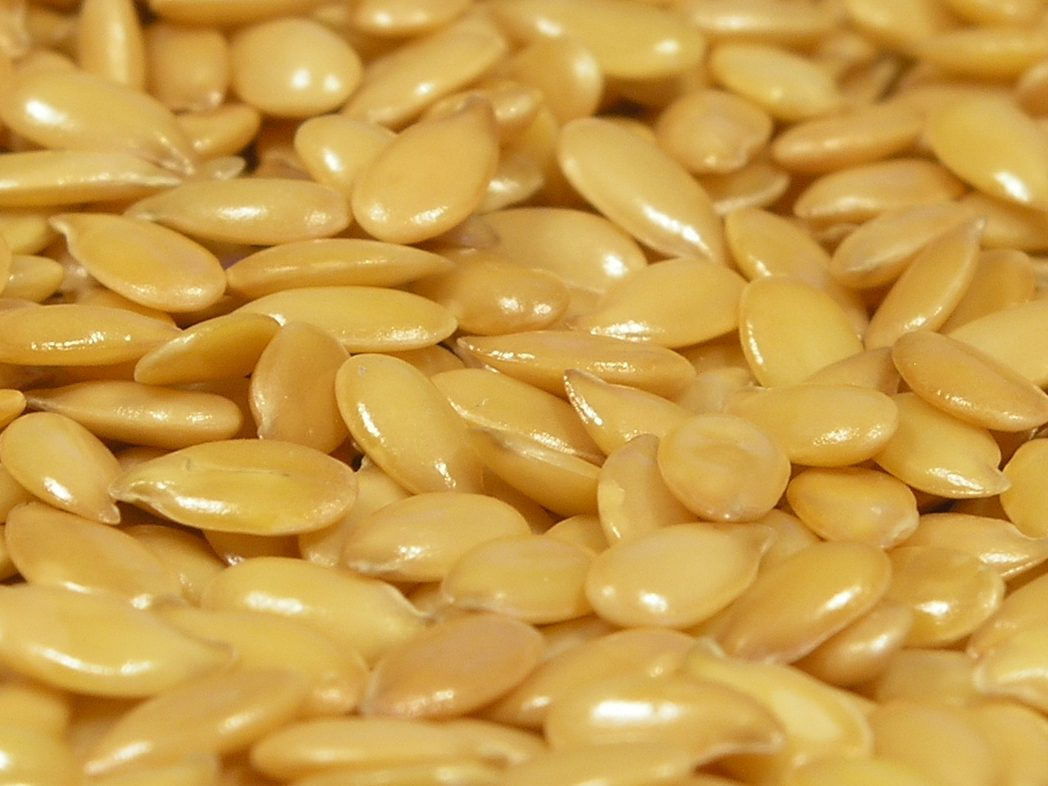 Flax seeds